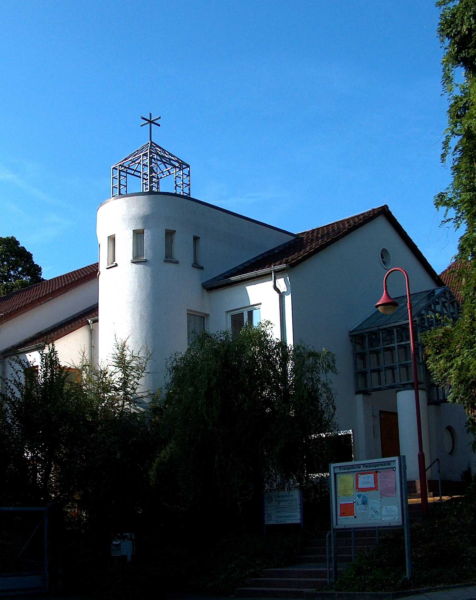 en.: protestant church St. Paul at Kelkheim, Germany . dt.: evangelisches Gotteshaus der Paulusgemeinde in Kelkheim, Hessen.